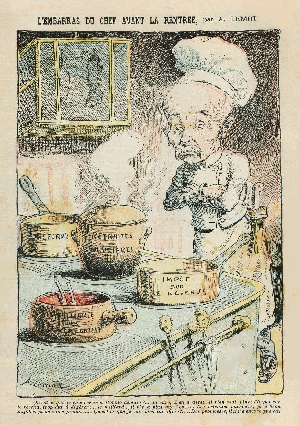 L'embarras du chef avant la rentrée, caricature de Georges Clemenceau par Achille Lemot, journal Le Pèlerin, 30 septembre 1906.